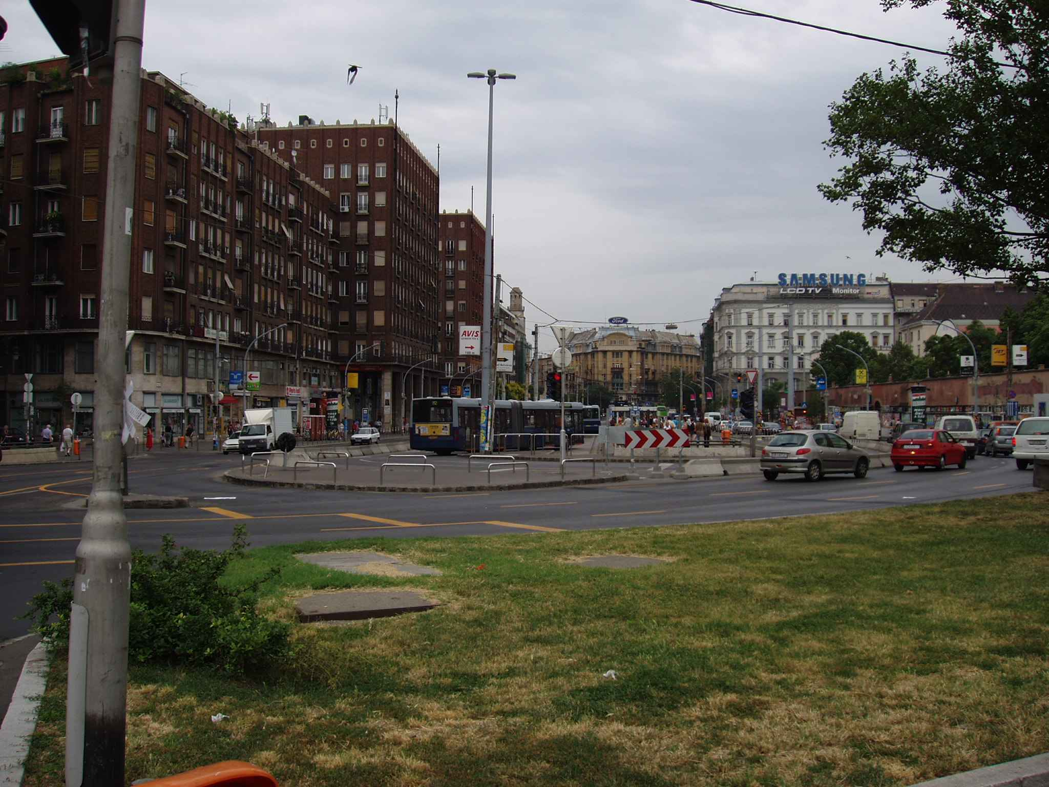 Náměstí Deák Ferenc tér v Budapešti.